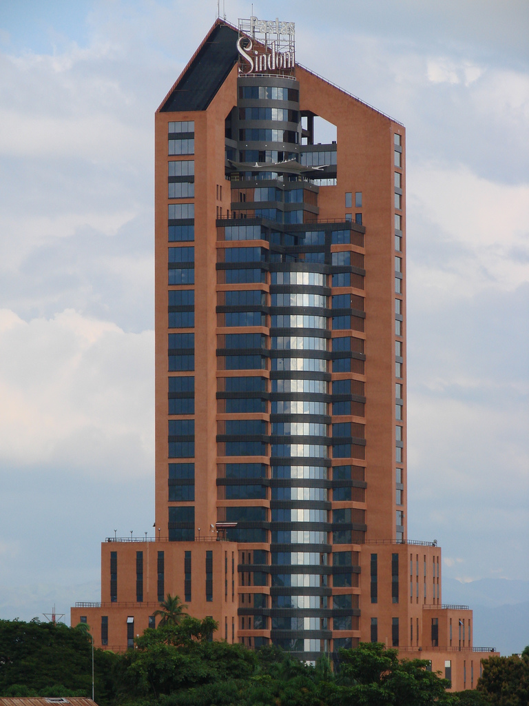 Entre avenida Bolívar y Miranda. Maracay. Estado Aragua. Venezuela.